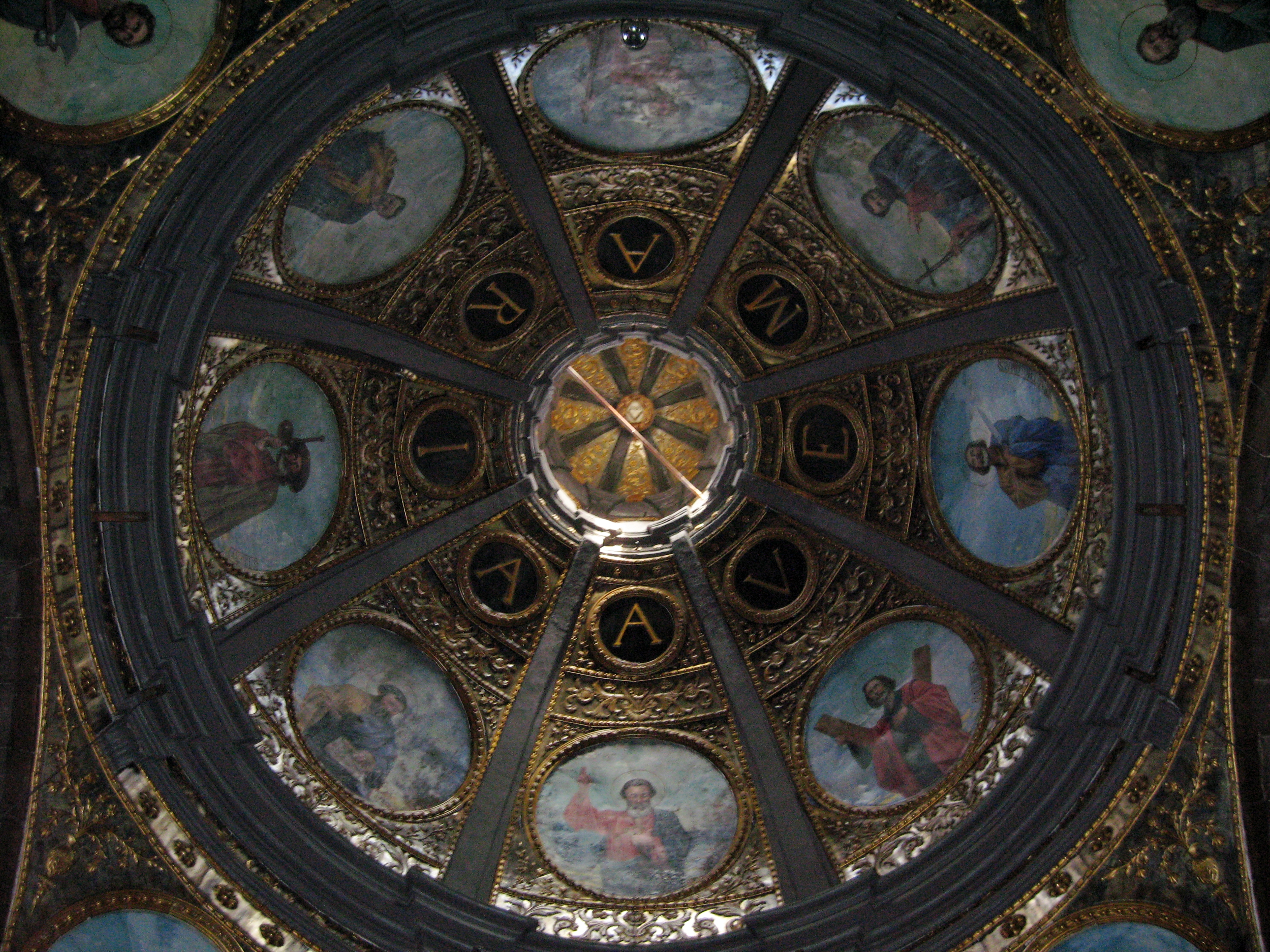 Santuari de Lluc, Gemeinde Escorca, Mallorca, Spanien